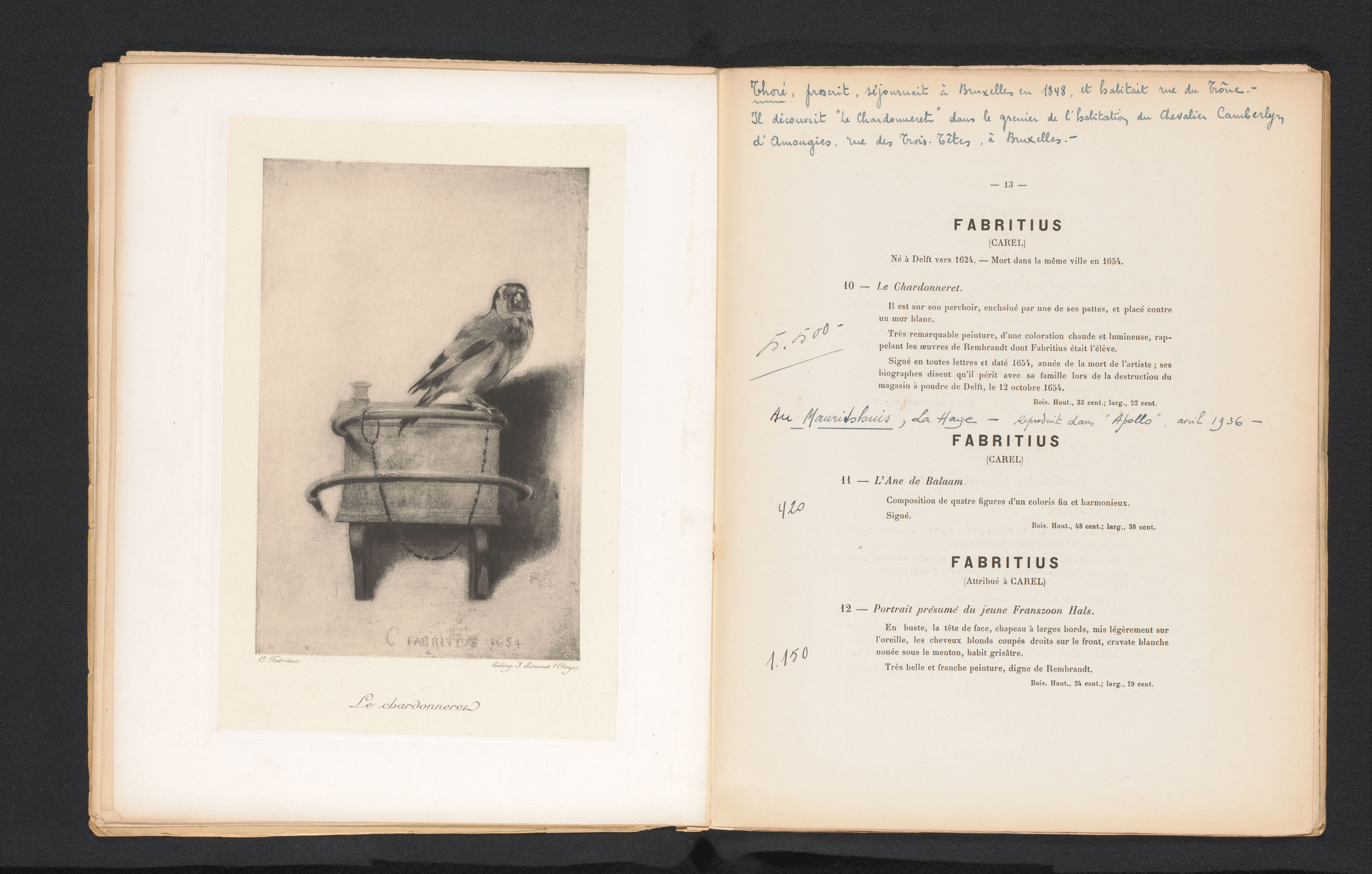 IdentificatieTitel(s): Reproductie van Het Puttertje van Carel FabritiusLe chardonneret (titel op object)Objecttype: fotomechanische afdruk reproductie bladzijde Objectnummer: RP-F-2001-7-1696-2VervaardigingVervaardiger: fotograaf: anoniemclichémaker: Simonet (vermeld op object)naar schilderij van: Carel Fabritius (vermeld op object)Datering: ca. 1887 - in of voor 1892Materiaal: papier Techniek: heliogravureAfmetingen: prent: h 185 mm × b 121 mmToelichtingPrent tegenover pagina 13.OnderwerpWat: painting, drawing and the graphic artssong-birds: goldfinchVerwerving en rechtenCredit line: Aankoop met steun van de Mondriaan Stichting, het Prins Bernhard Cultuurfonds, het VSBfonds, het Paul Huf Fonds/Rijksmuseum Fonds en het Egbert KunstfondsVerwerving: aankoop 2001Copyright: Publiek domein